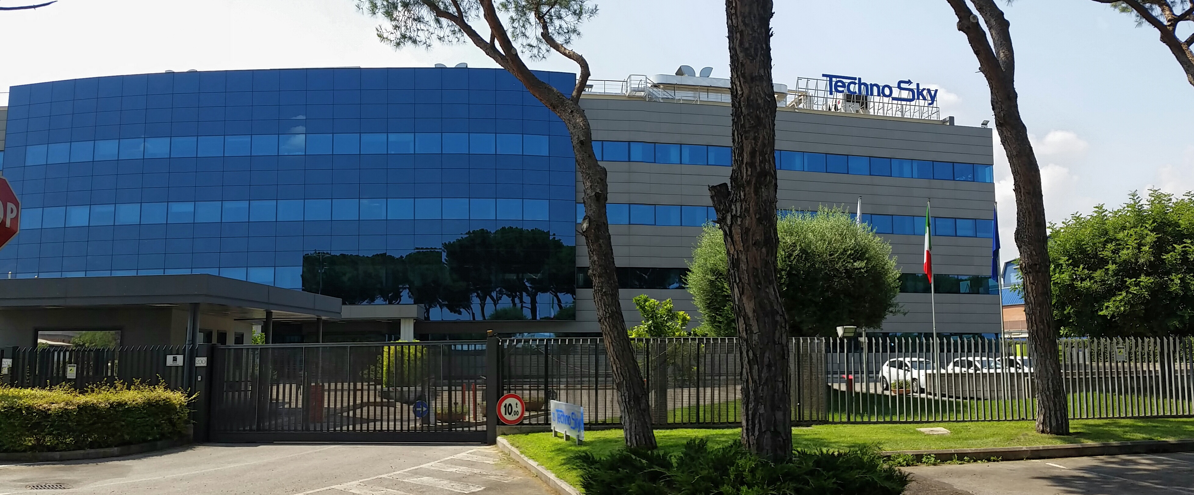 Sede centrale di TechnoSky a Roma, via del Casale Cavallari 200